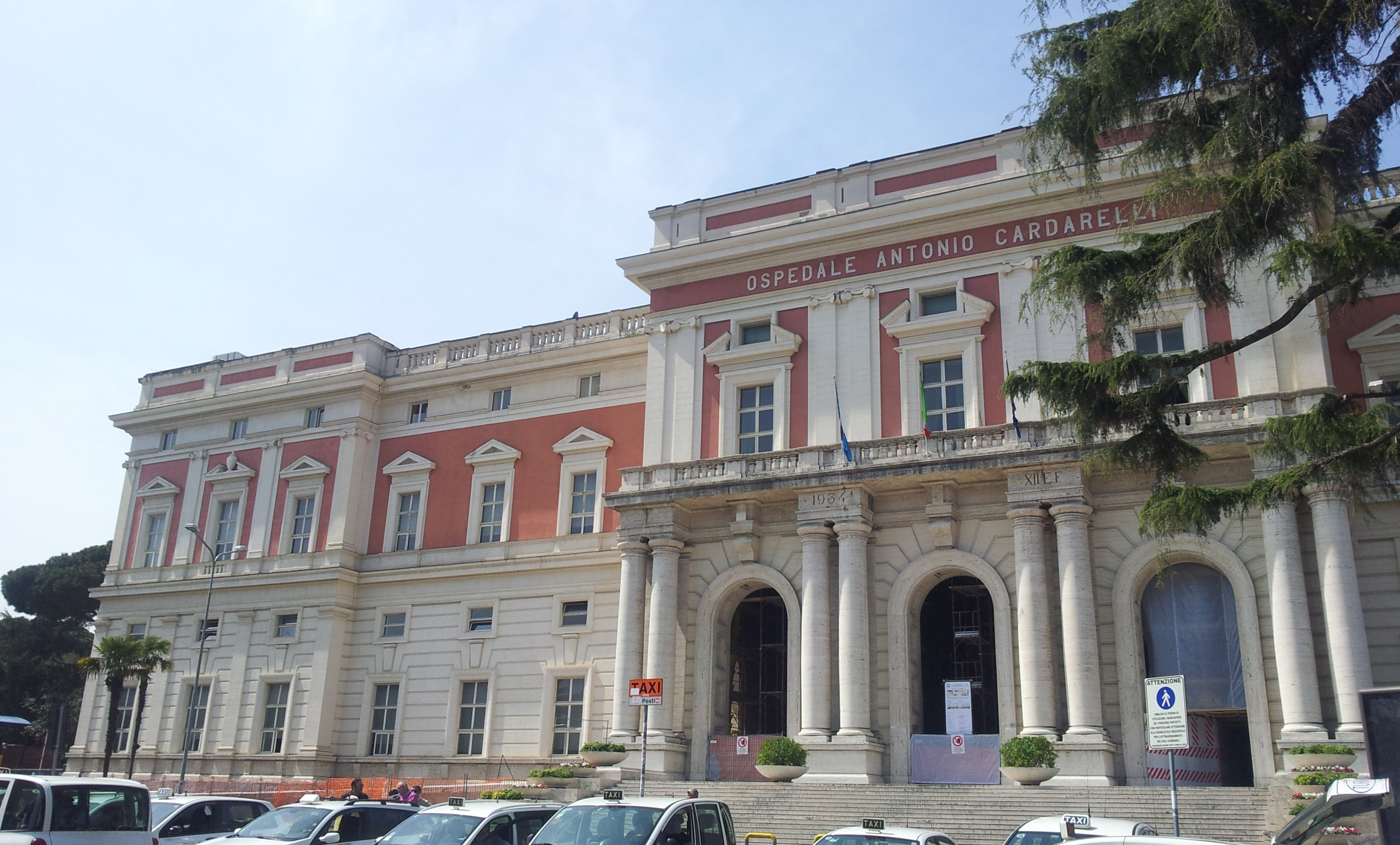 Cardarelli